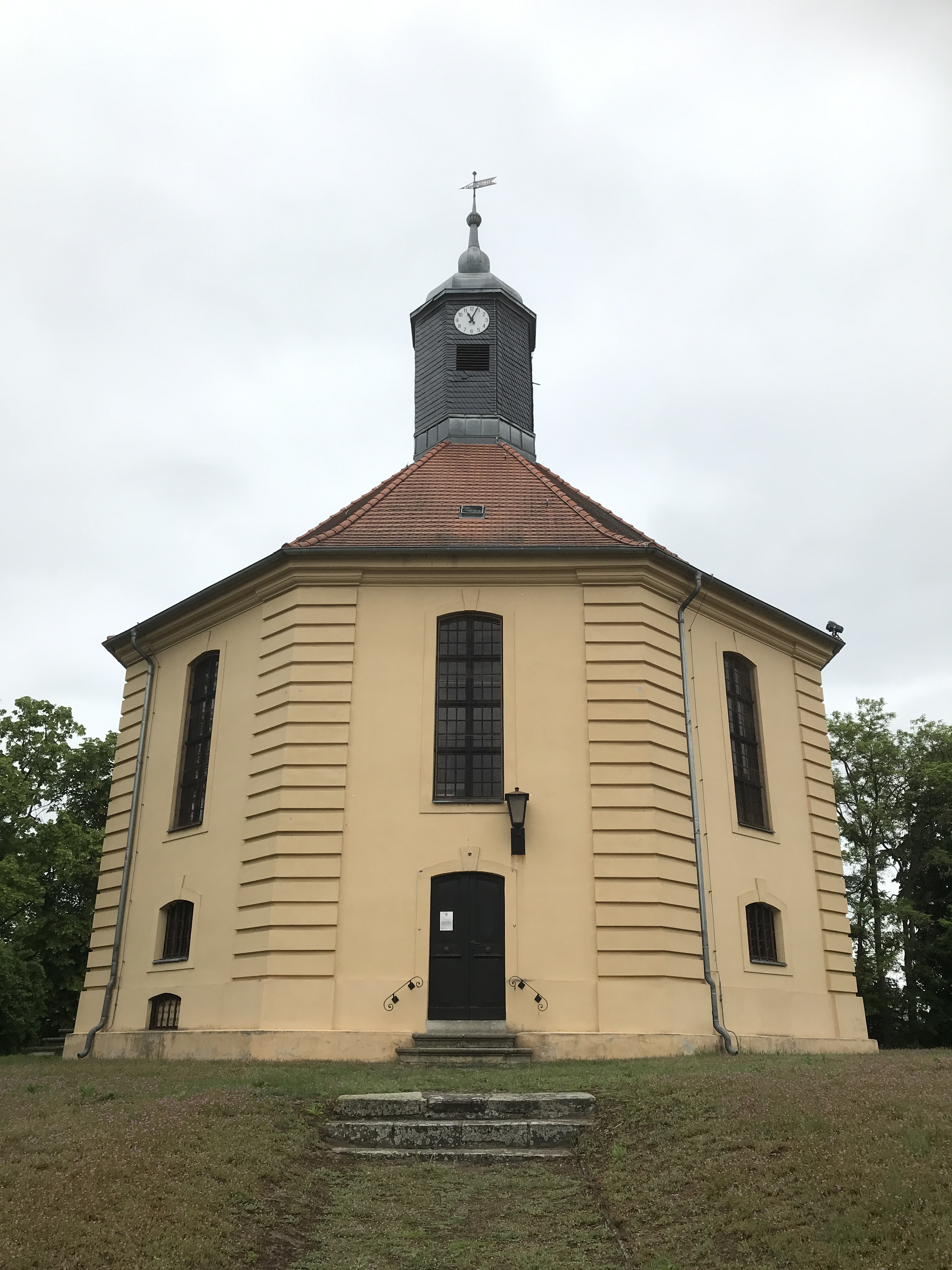 Im Innern befindet sich unter anderem die Gruft derer von Rochows.